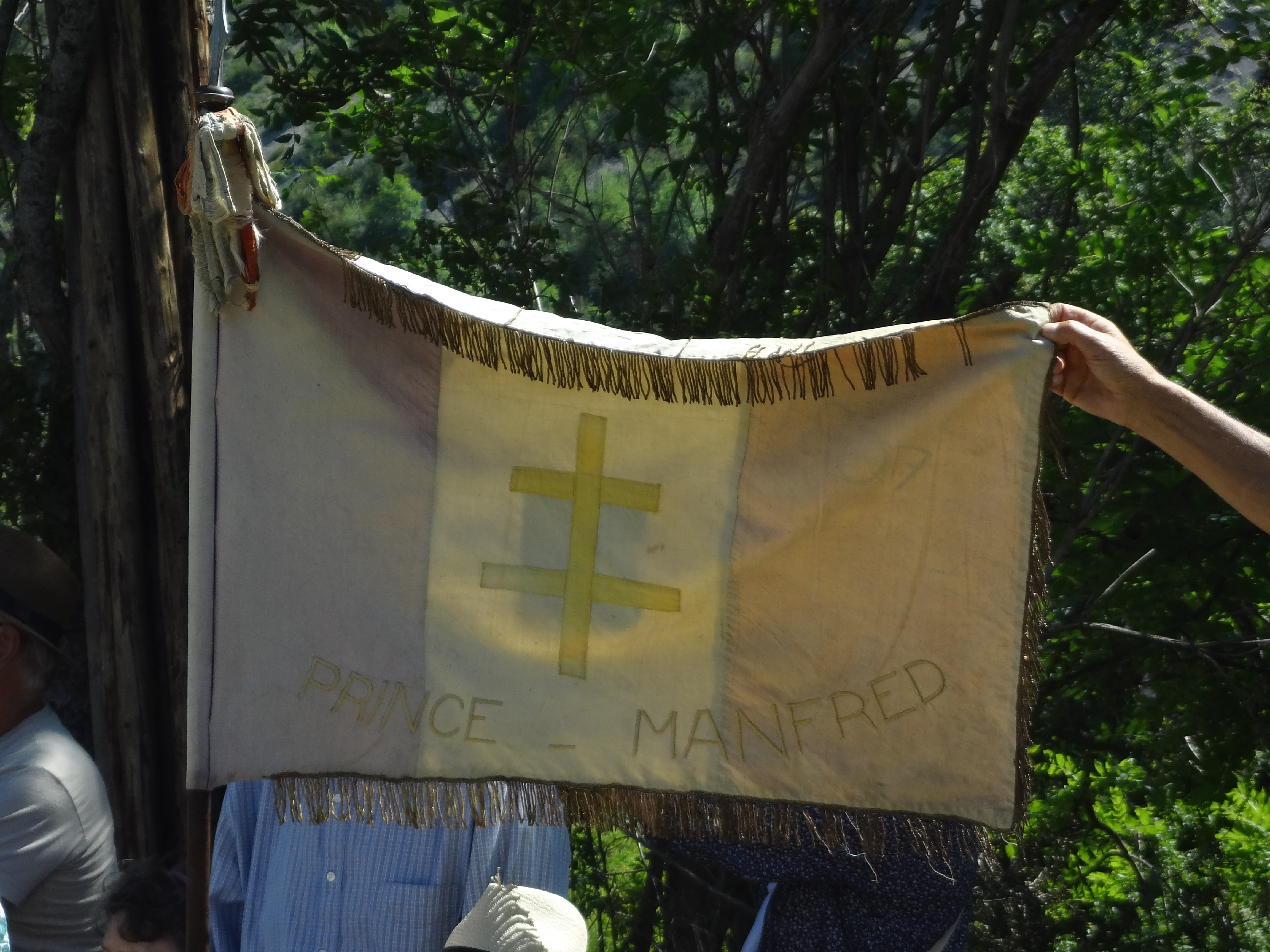 Téléchargée avec Commonist 0.9.1